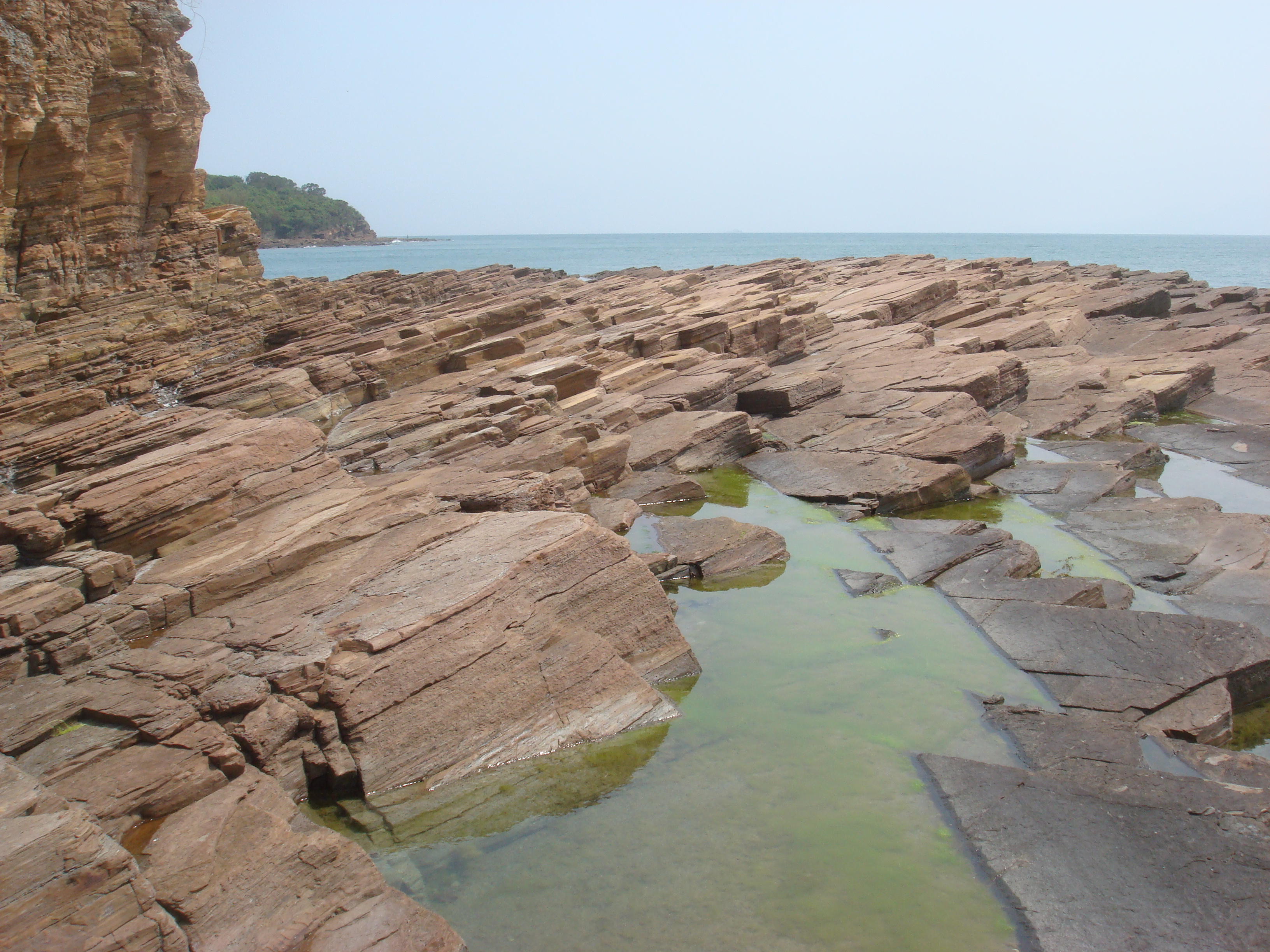 Tung Ping Chau, Hong Kong